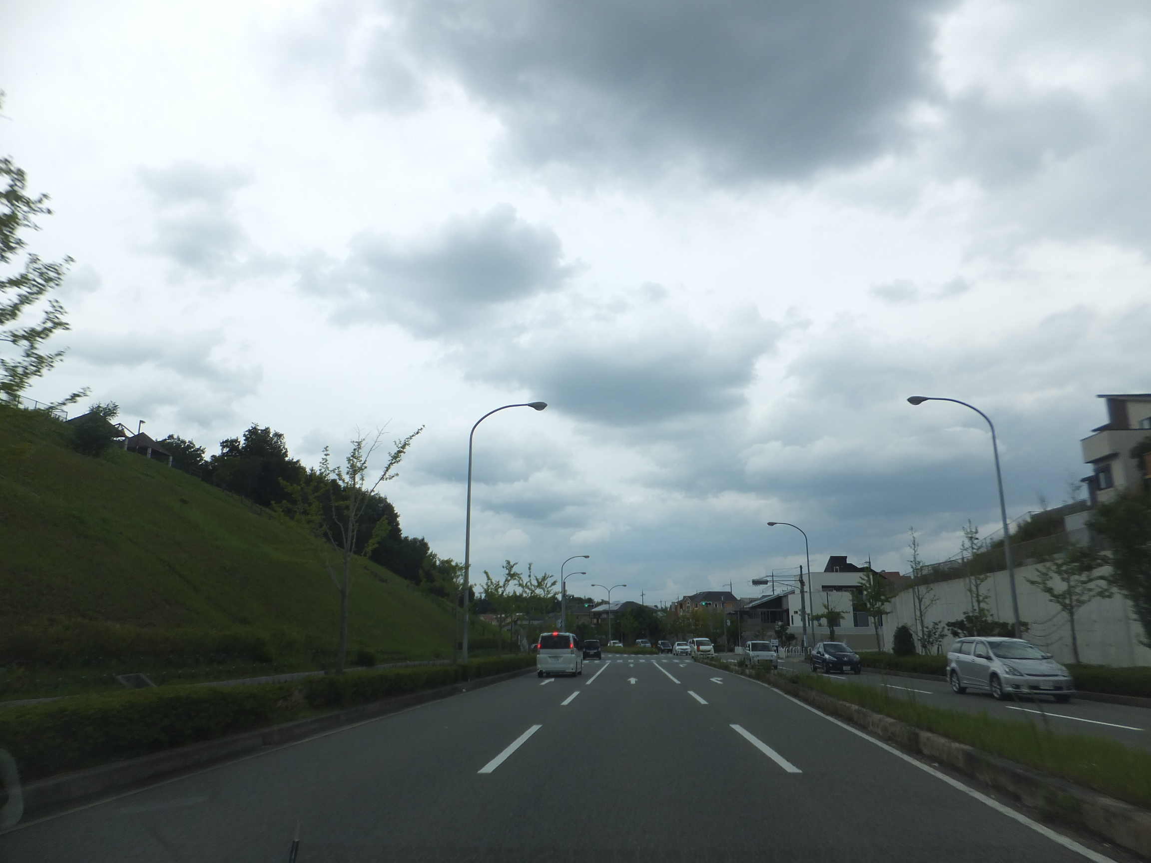 兵庫県神戸市北区上津台7丁目